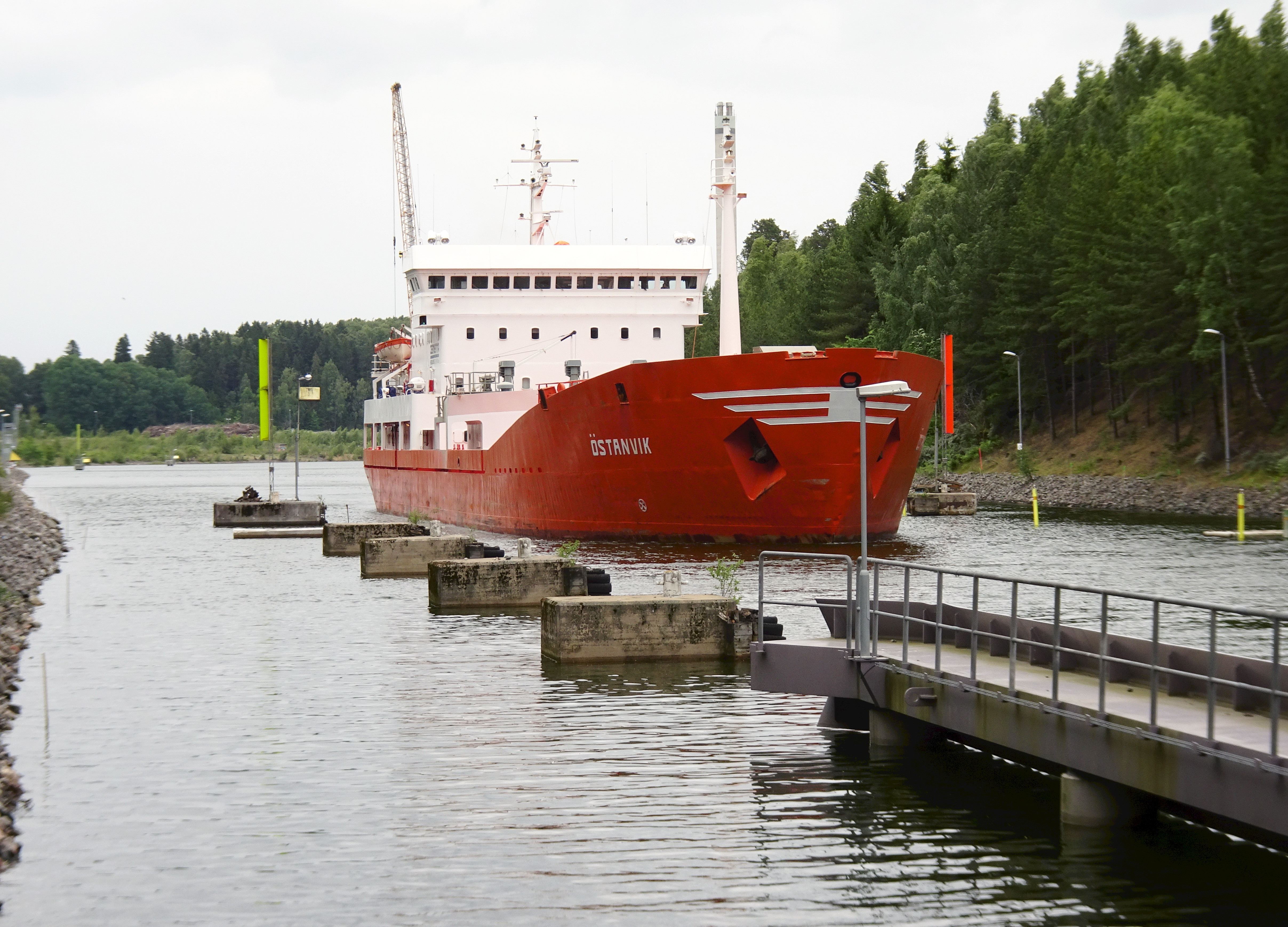 M/S Östanvik i Södertälje kanal